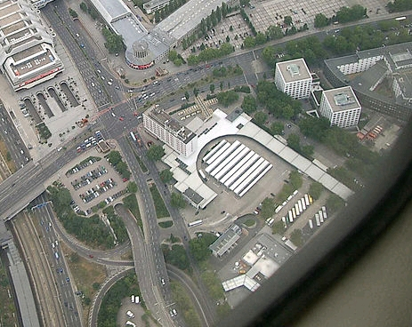 Luftbild des Busbahnhofs in Berlin Charlottenburg. Teilausschnitt von File:ICCBerlinluft.jpg